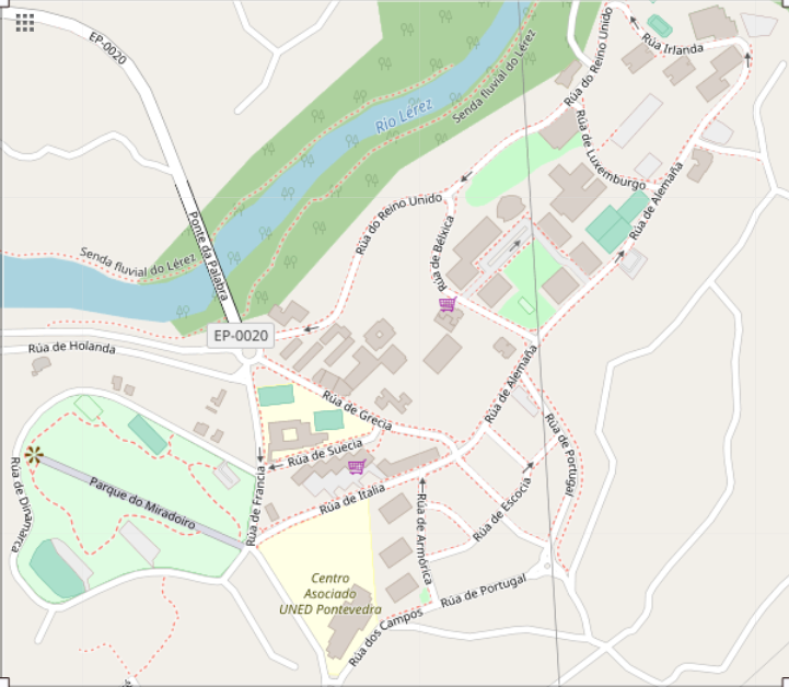 Geographic limits of the map: N: 42.4502° S: 42.4419° W: -8.6311° E: -8.6182°